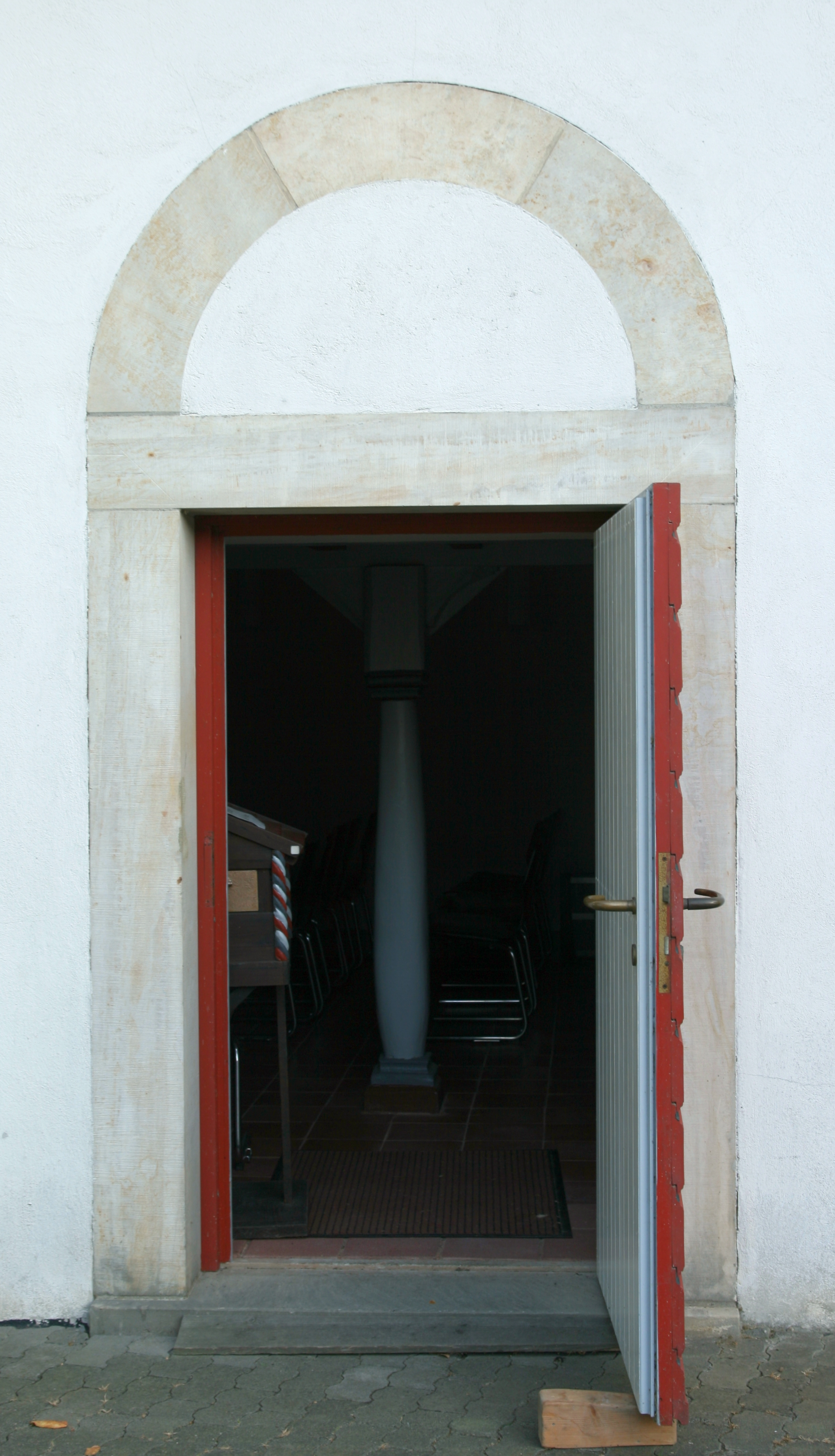 Weidenhausen Alte Kirche Tür Nordseite